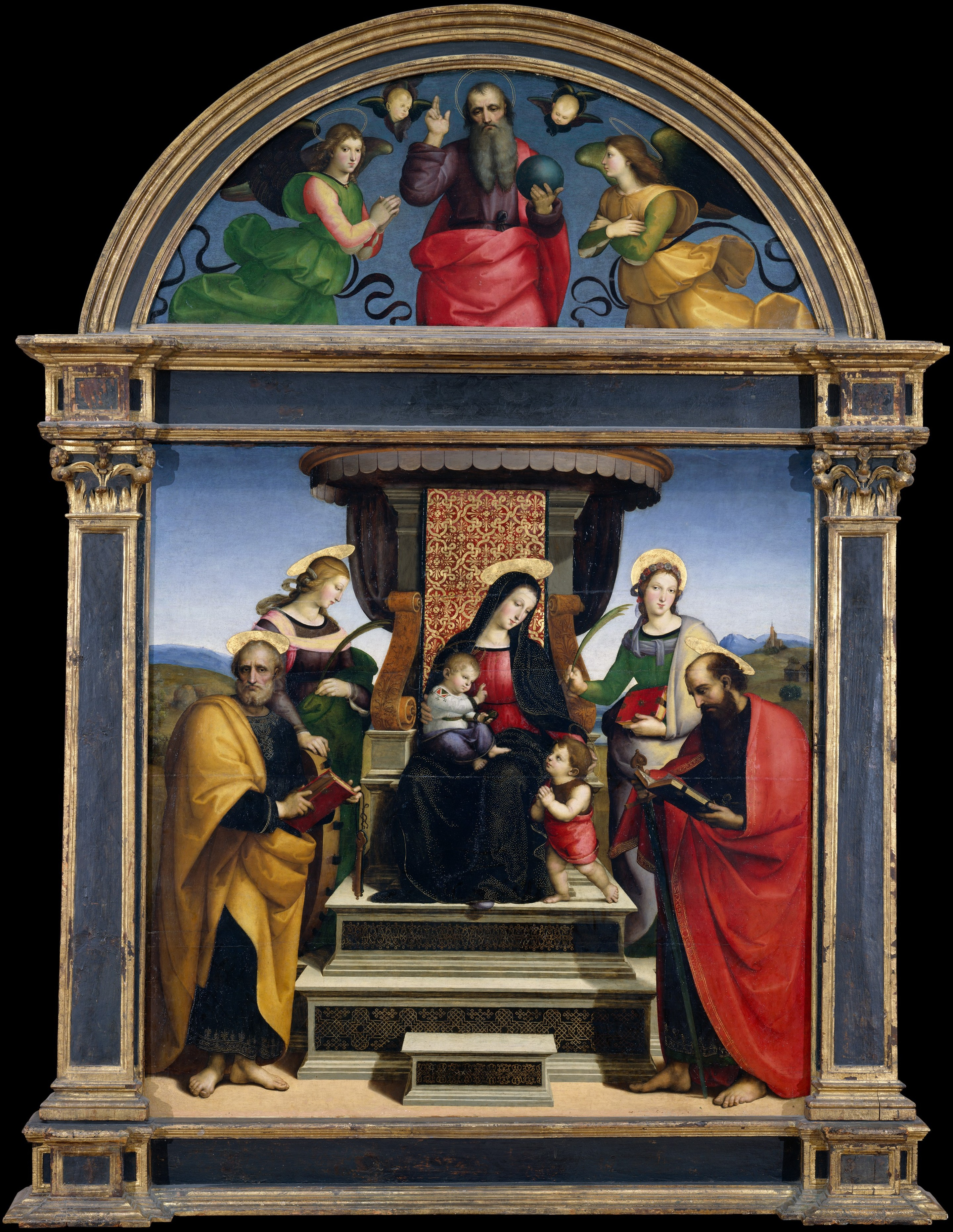 en: Madonna and Child Enthroned with Saints pl: Madonna i Dzieciątko na tronie ze świętymi pt: Madona e o Menino Entronados com Santos